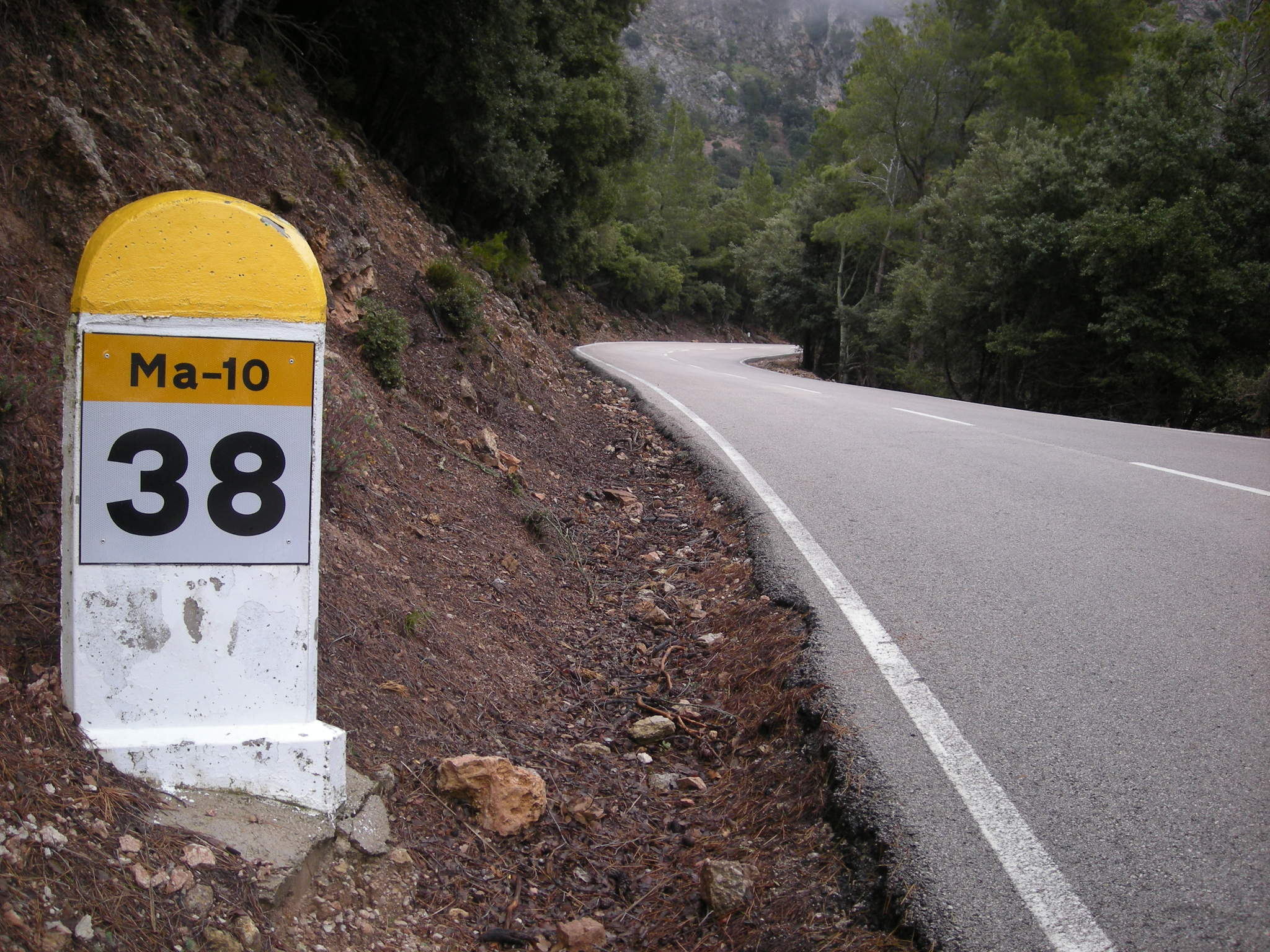 Punt quilomètric 38 de la carretera Ma-10, entre Sóller i Escorca, a l'alçada de la Coma de n'Arbona.